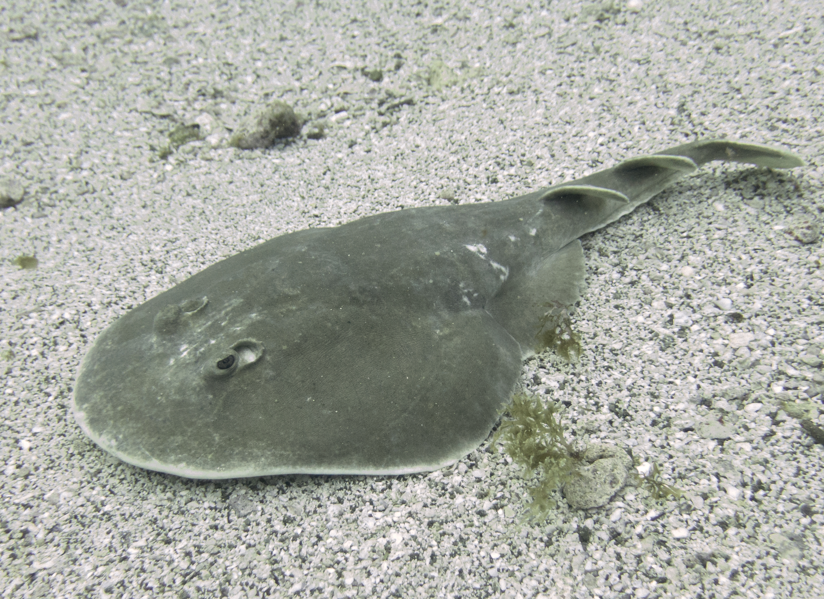 Giant electric ray (Narcine entemedor)